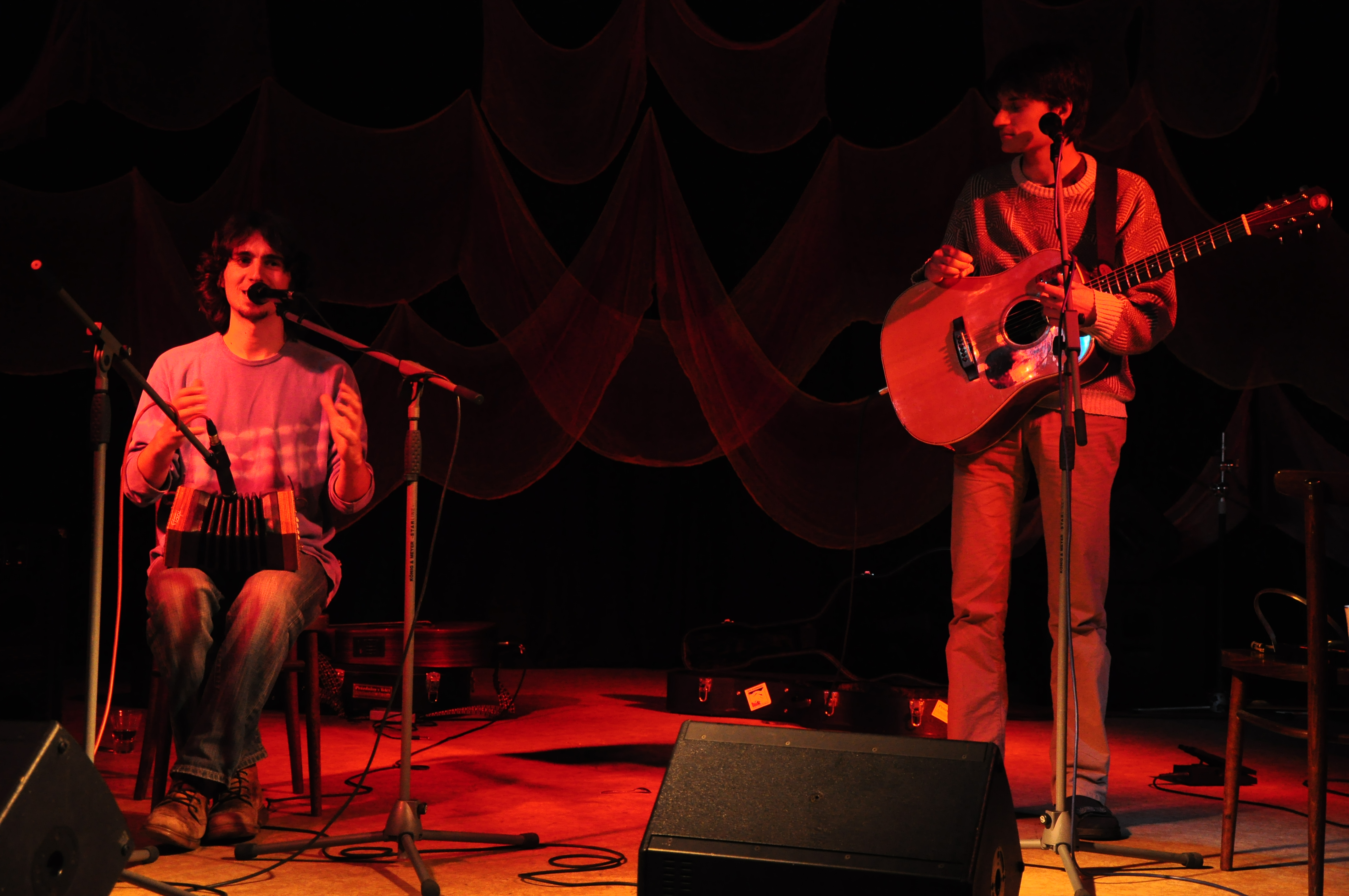 Nestíháme in Máme na to?! music festival, Chotěboř, Czech Republic